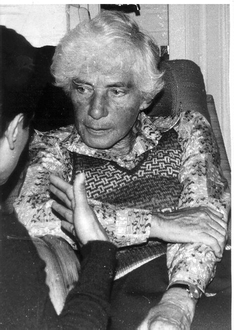 Marie Langer, en supervisión, alrededor de 1979 en su casa en Coyoacán, México.